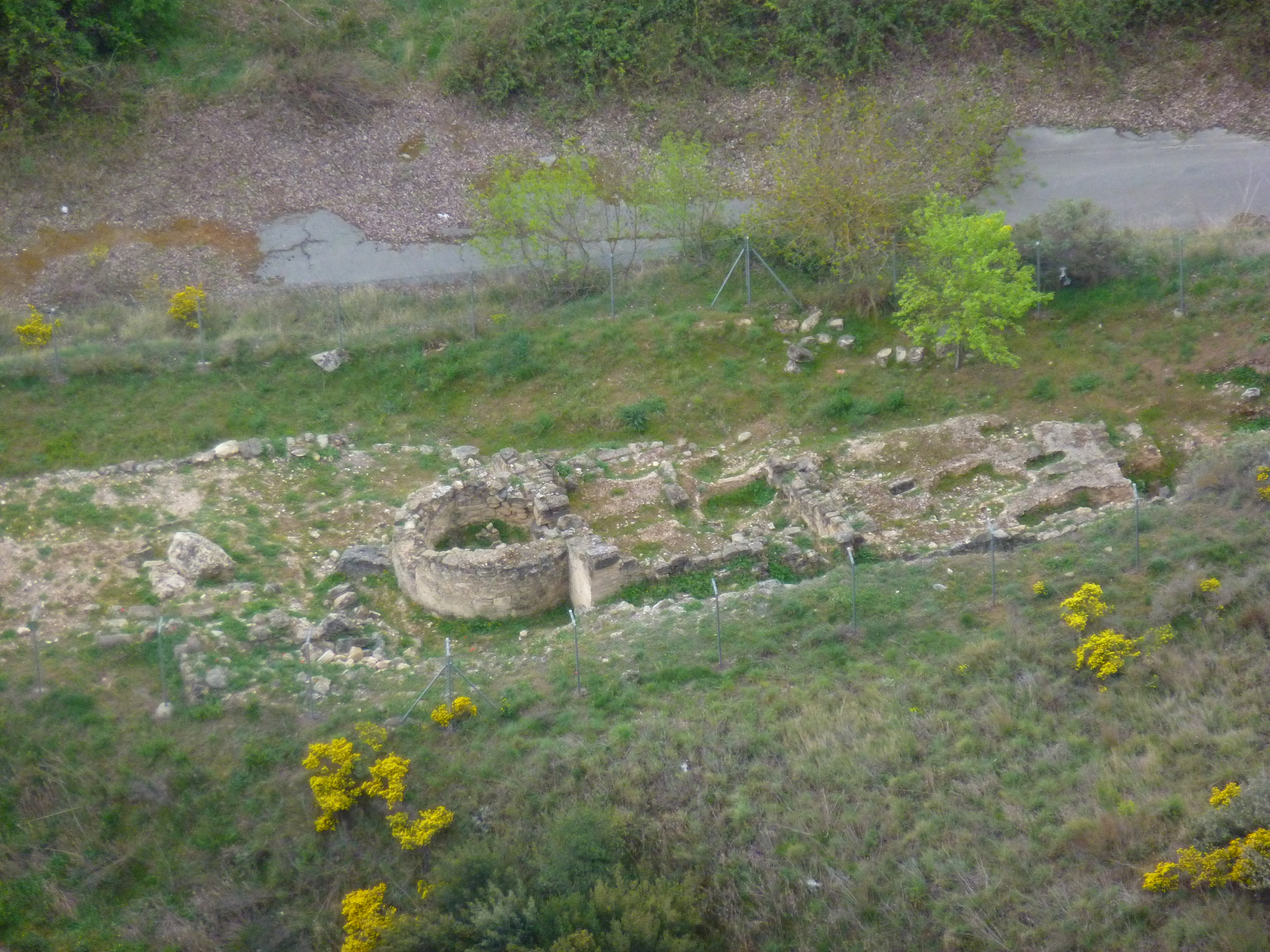 Ruinas del poblado de Buradón con su Iglesia paleocristiana de San Mamés.